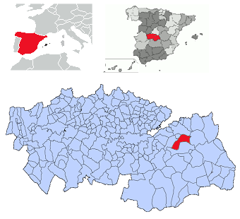 Dosbarrios en la provincia de Toledo